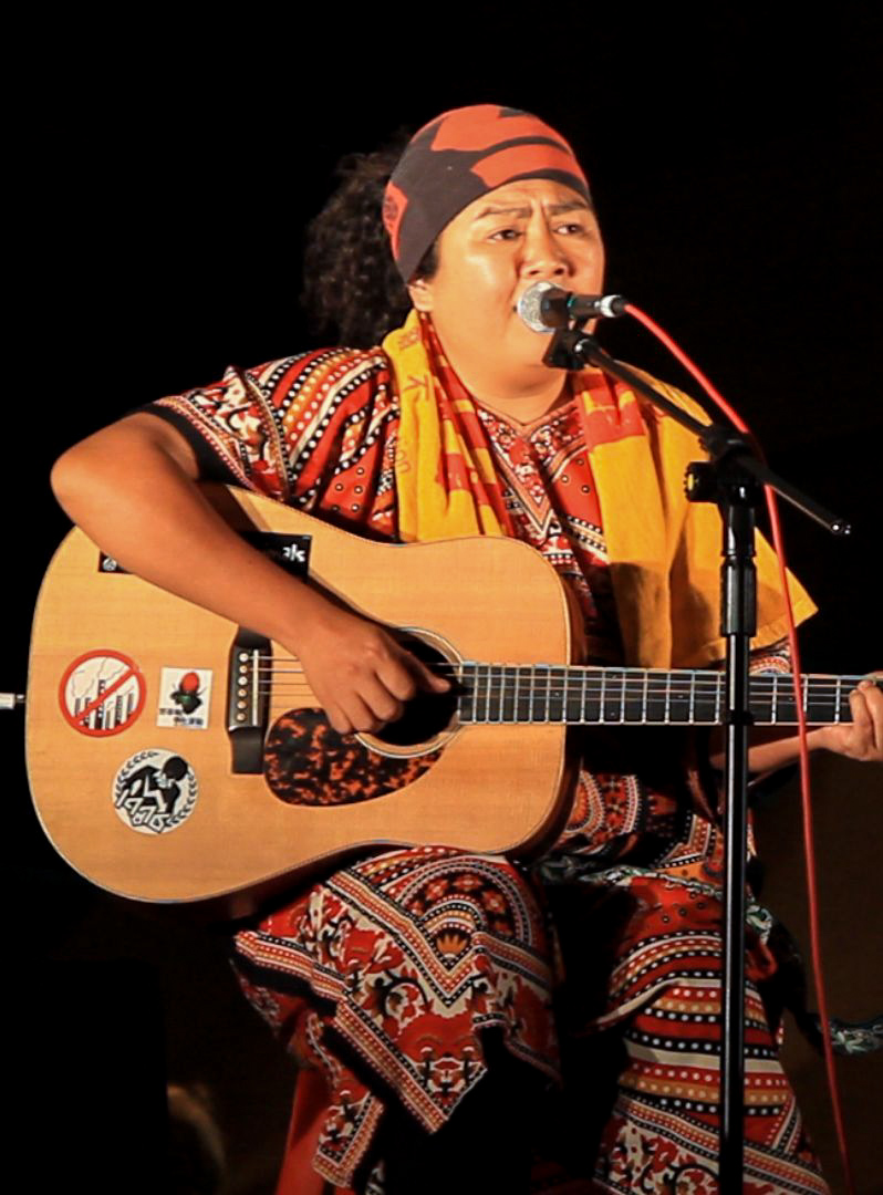 中文（台灣）: Panai Kusui (巴奈·庫穗) 2014年於太陽花學運濟南路側舞台獻唱聲援